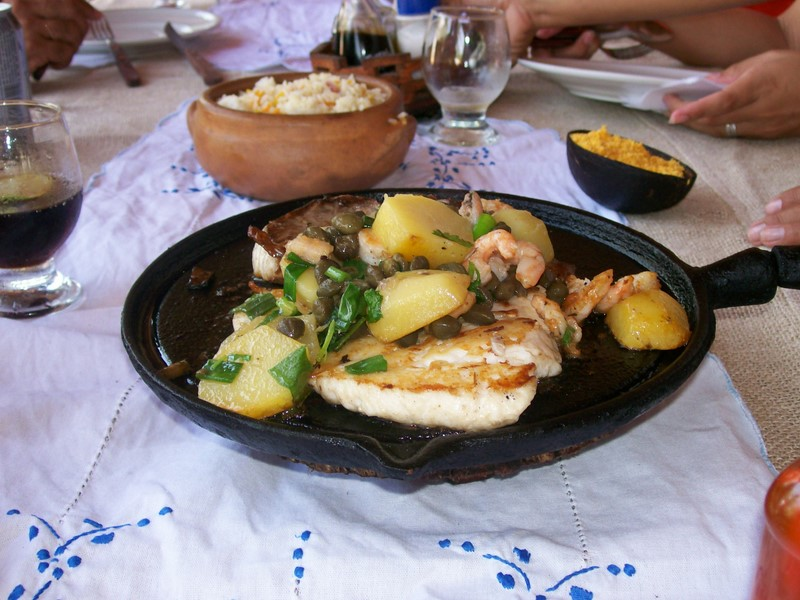 Bom apetite